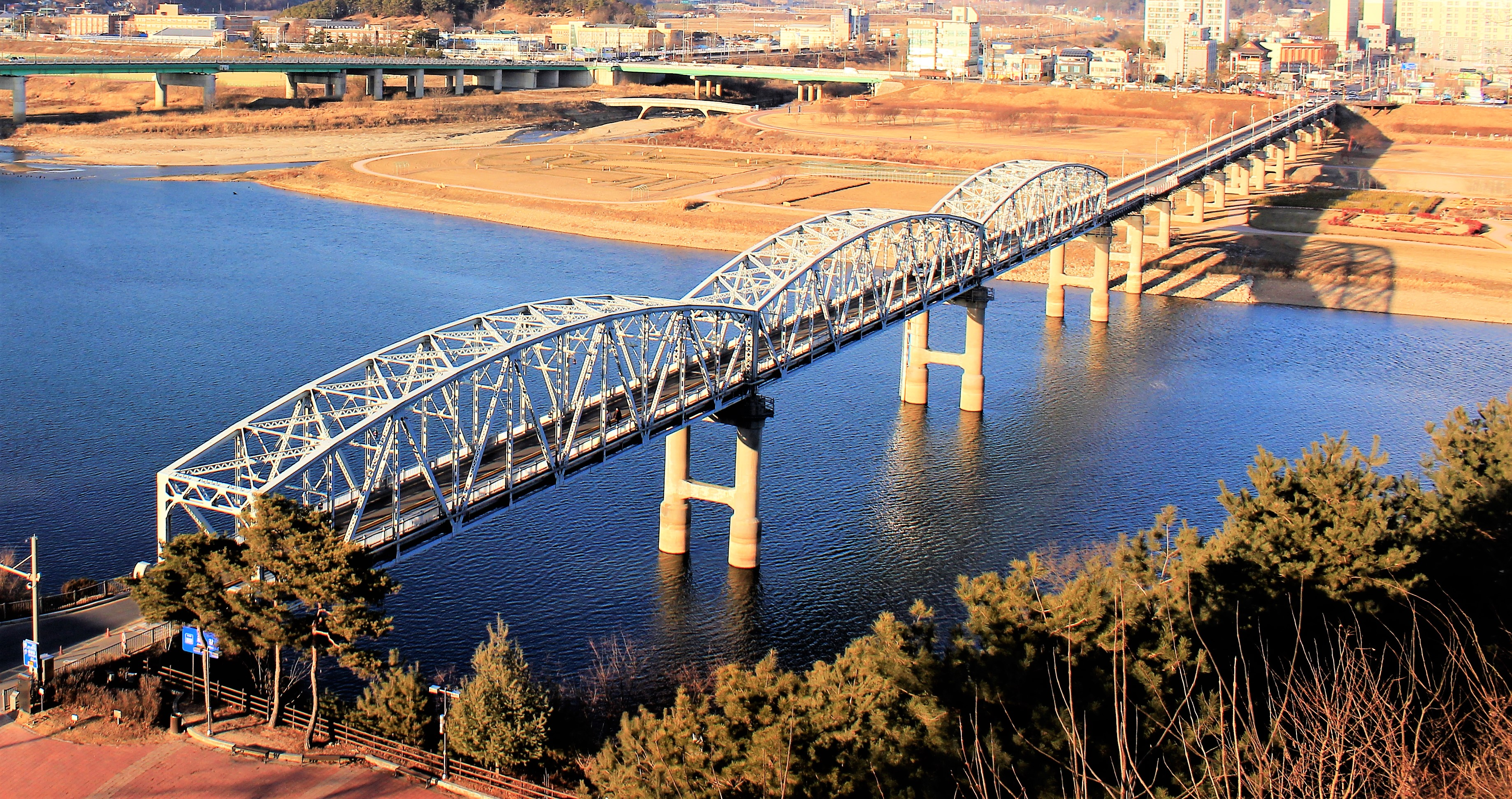 2019년 촬영한 금강철교